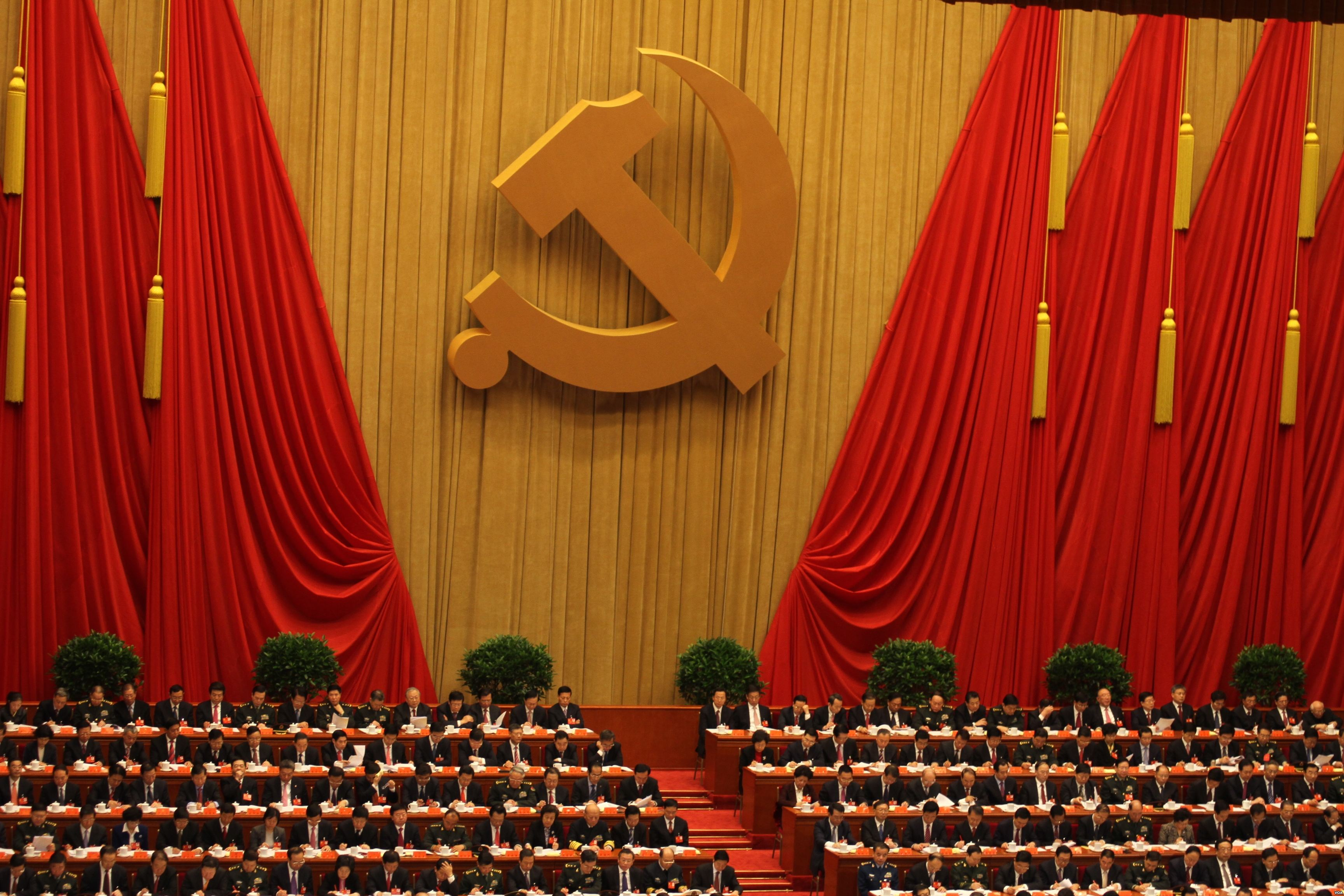 中国共产党第十八次全国代表大会会场。